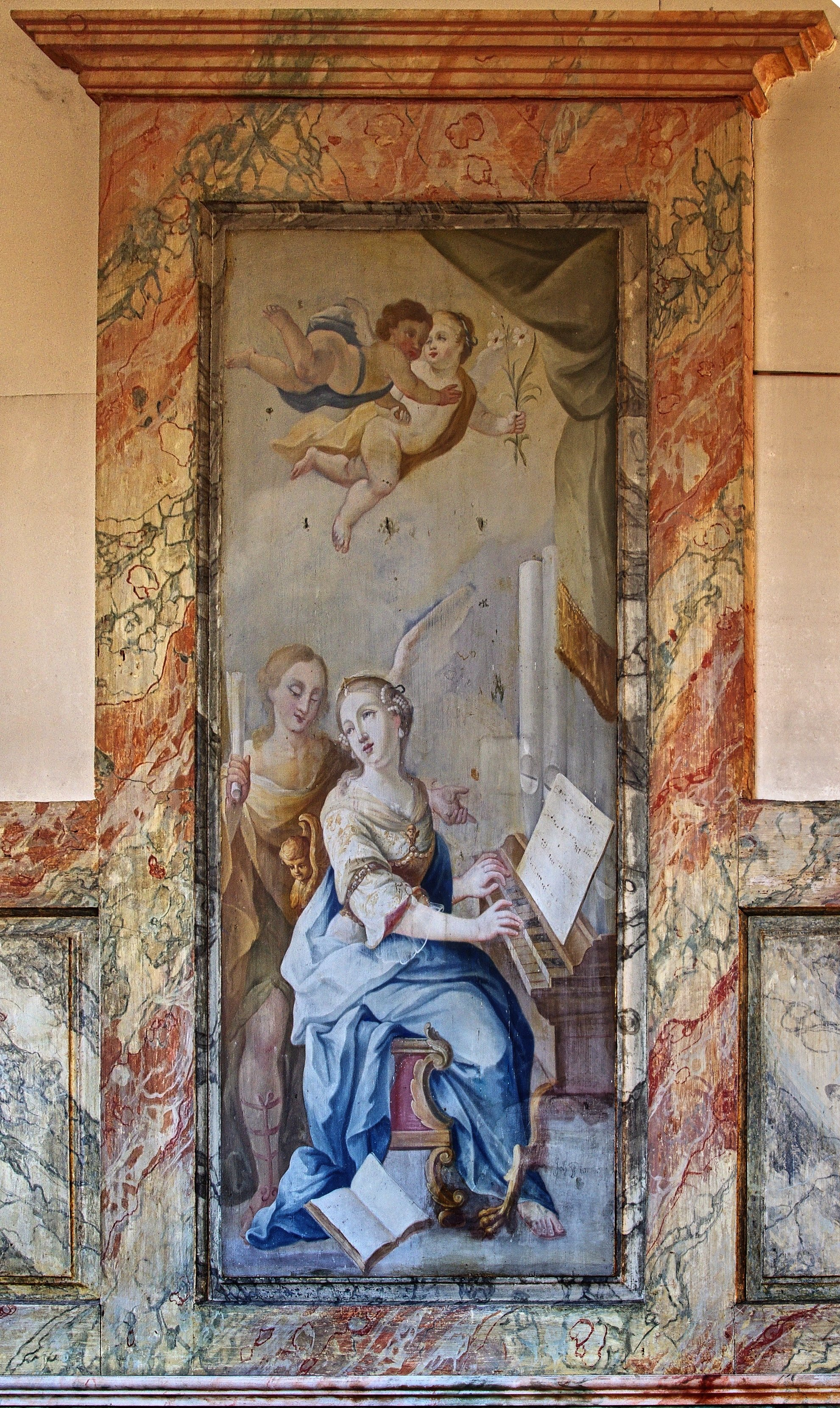 Aufnahmen aus der Adelhauser Kirche